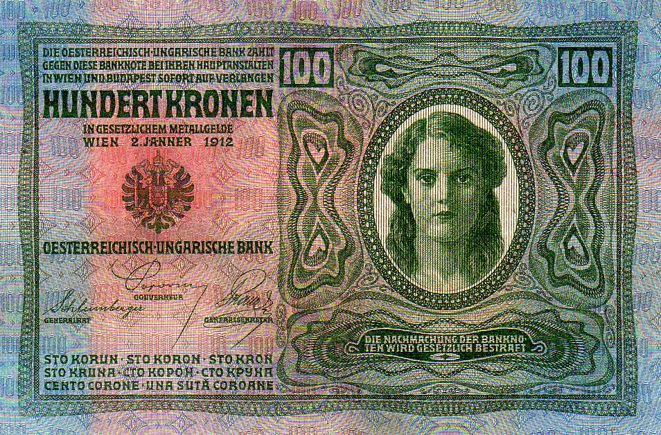 100 Austro-Hungarian Krone/korona (1912) - obverse